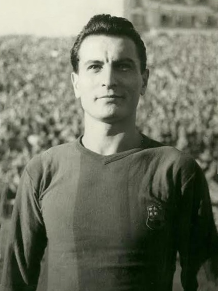 Nicolae Simatoc